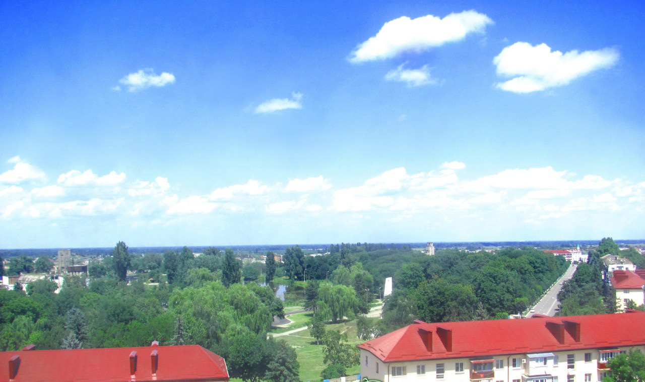 Вид на центральный парк Нарткалы